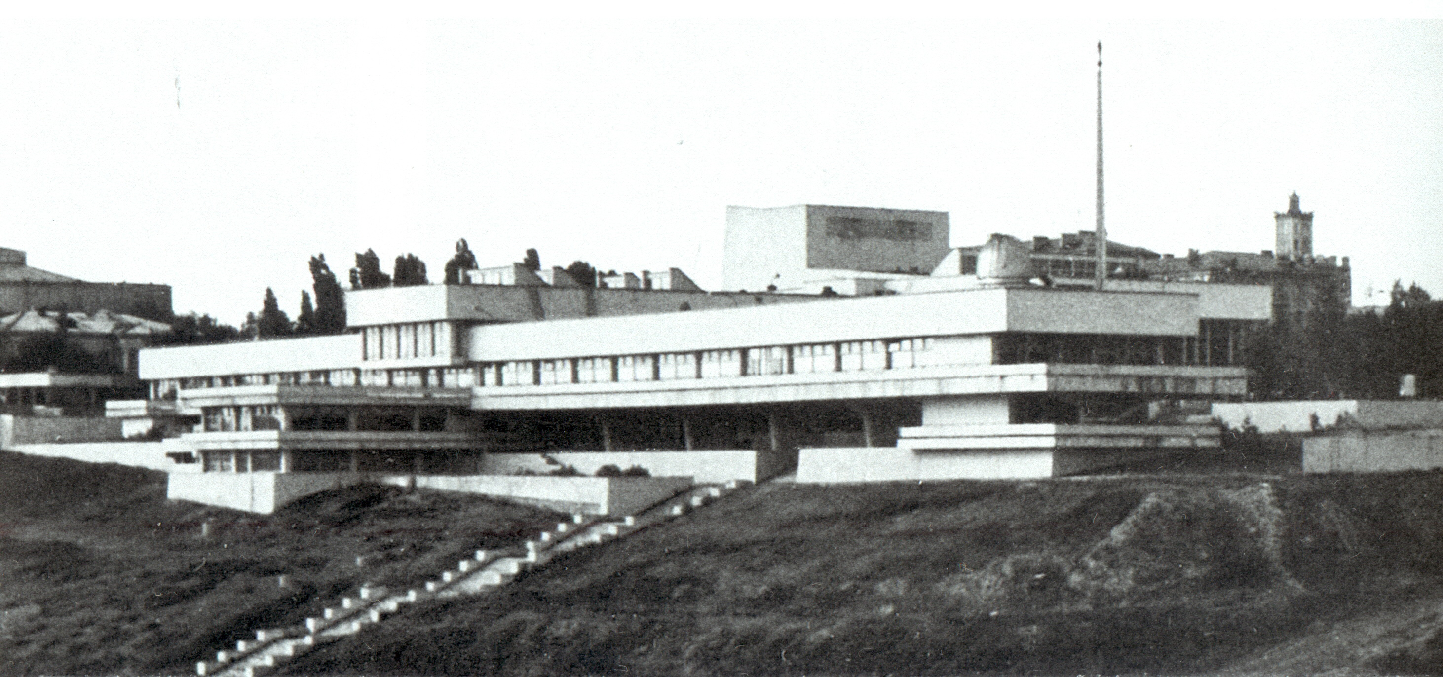 Городской детско-юношеский центр (ГДЮЦ) или Дворец пионеров. Волгоград.